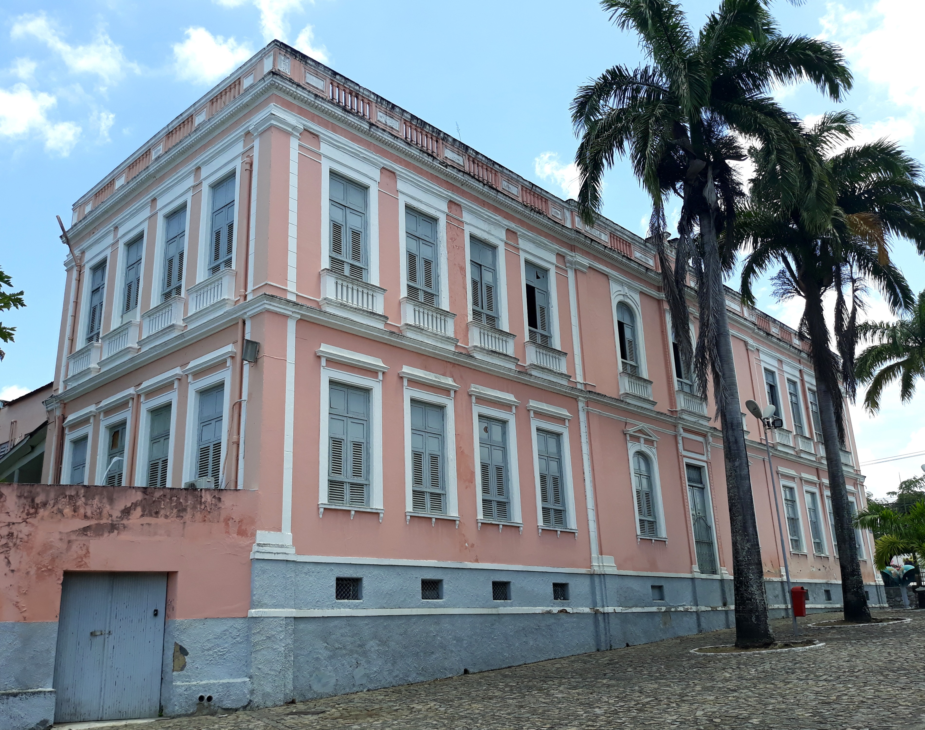 Faculdade de Ciências Médicas da Paraíba (instituição privada) em João Pessoa (Brasil) nesse prédio funcionou o antigo Colégio Pio XII.